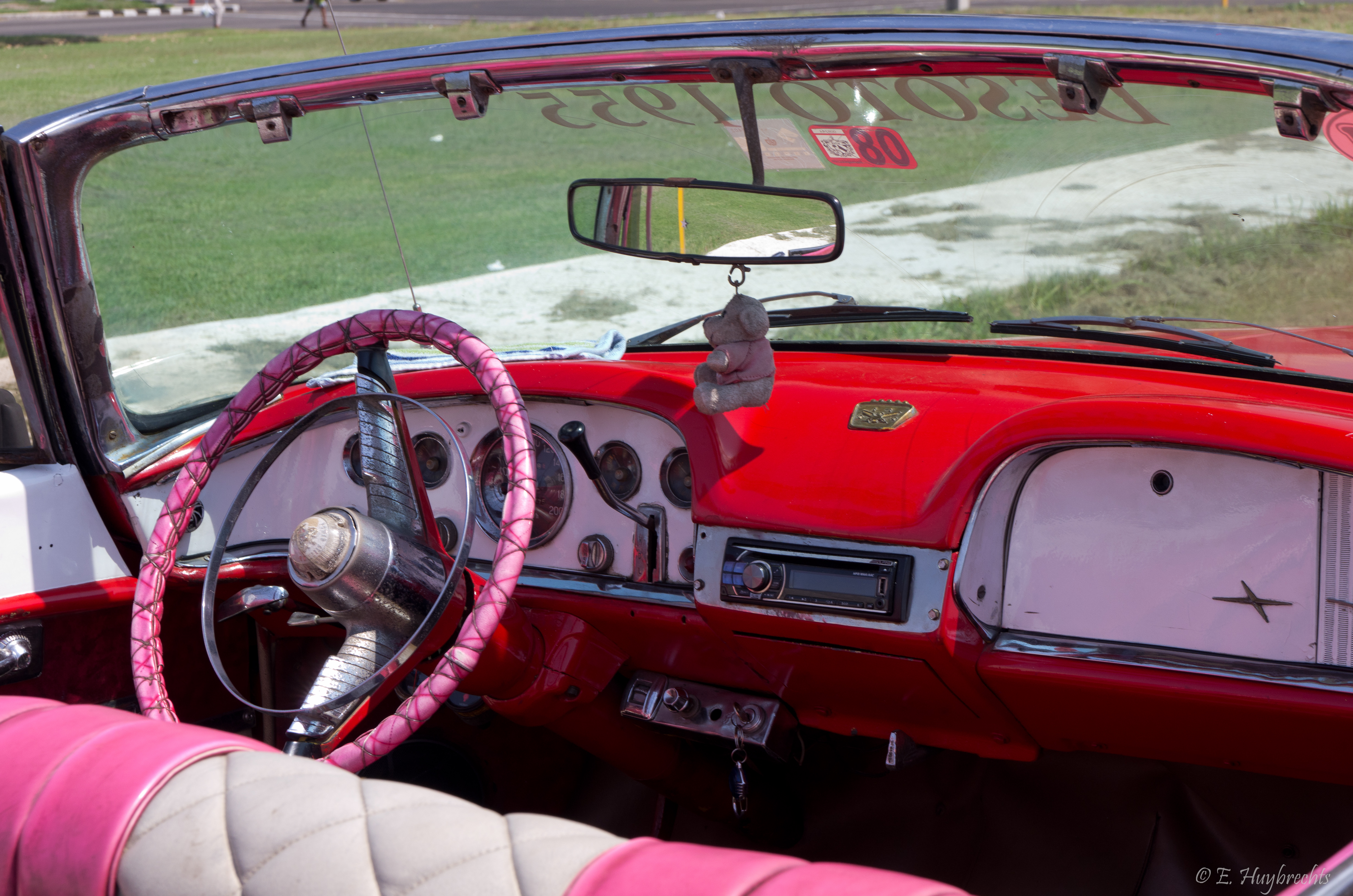 Desoto 1955